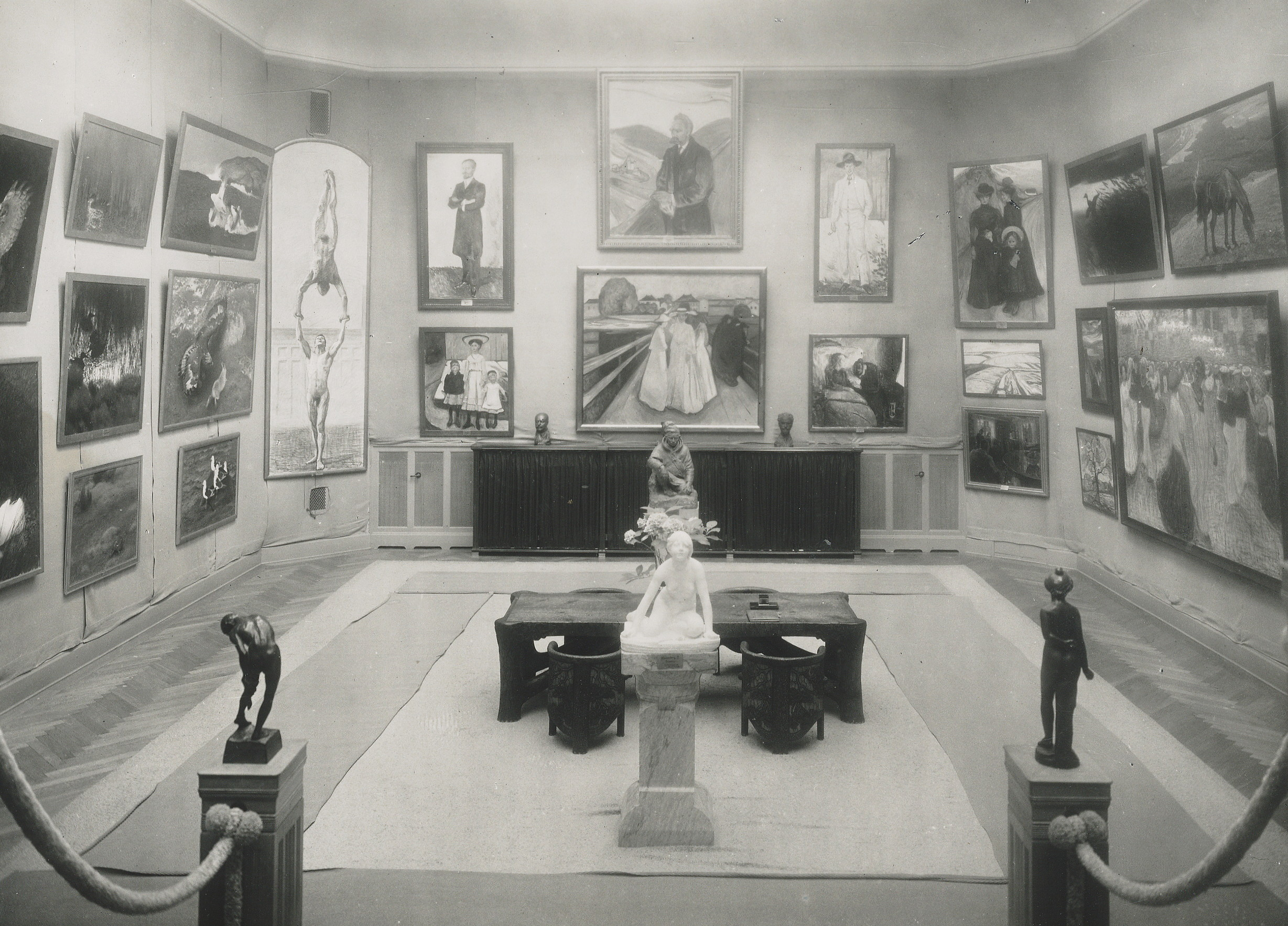 Thielska galleriet, utställningssal (Munchsalen)